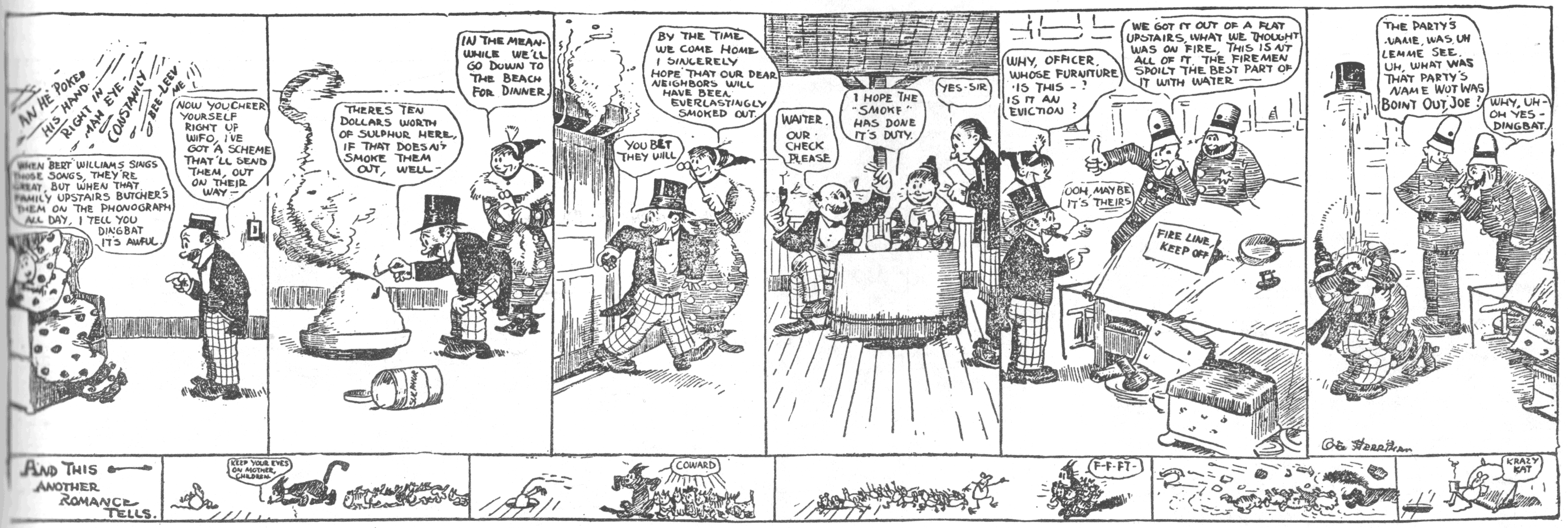 Ein The-Family-Upstairs-Strip (auch: Dingbat Family). Die bisherigen Nebenfiguren Maus und Katze haben einen eigenen, unten angefügten Streifen erhalten.